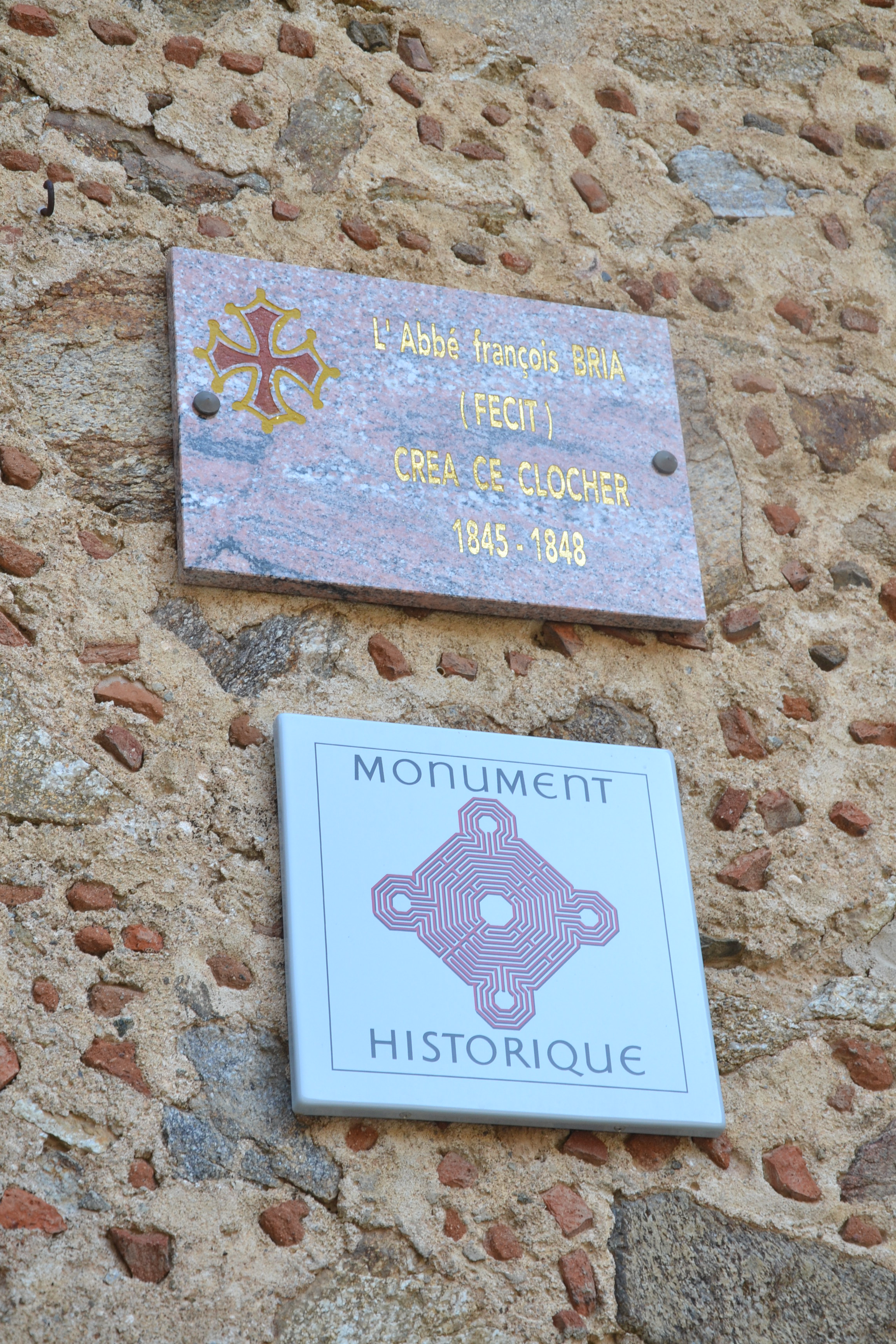 Plaques sur le clocher de l'église Saint-Etienne de Caramany (Pyrénées-Orientales, France).